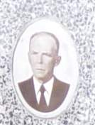 Zdjęcie nagrobne Stanisława Siczka (Photo of Stanisław Siczek)